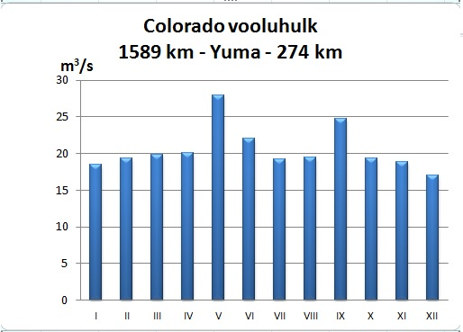 Colorado hudrograaf